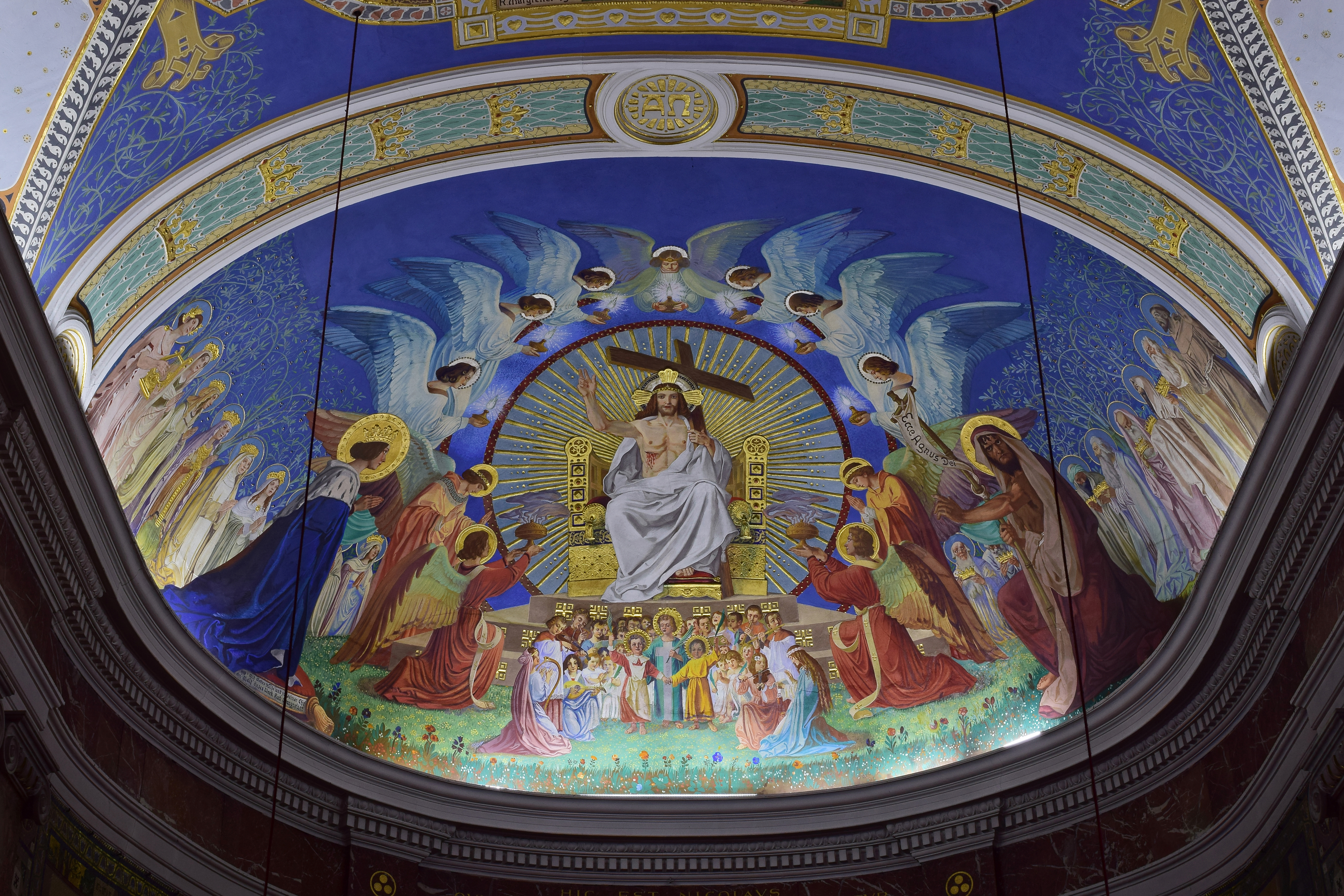 Die Pfarrkirche St. Nikolaus in Reith bei Seefeld wurde 1895 errichtet. Nach Kriegsschäden wurde sie 1950 wiederhergestellt und 1989/90 in den Stand von 1911–1921 versetzt. Die Deckenmalerei wurde 1910/1911 von Rudolf Margreiter angefertigt.